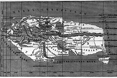 Weltkarte des griechischen Geografen Strabo Urheberrecht ist erloschen (incl. Reproduktionen), da Author seit Ewigkeiten tot